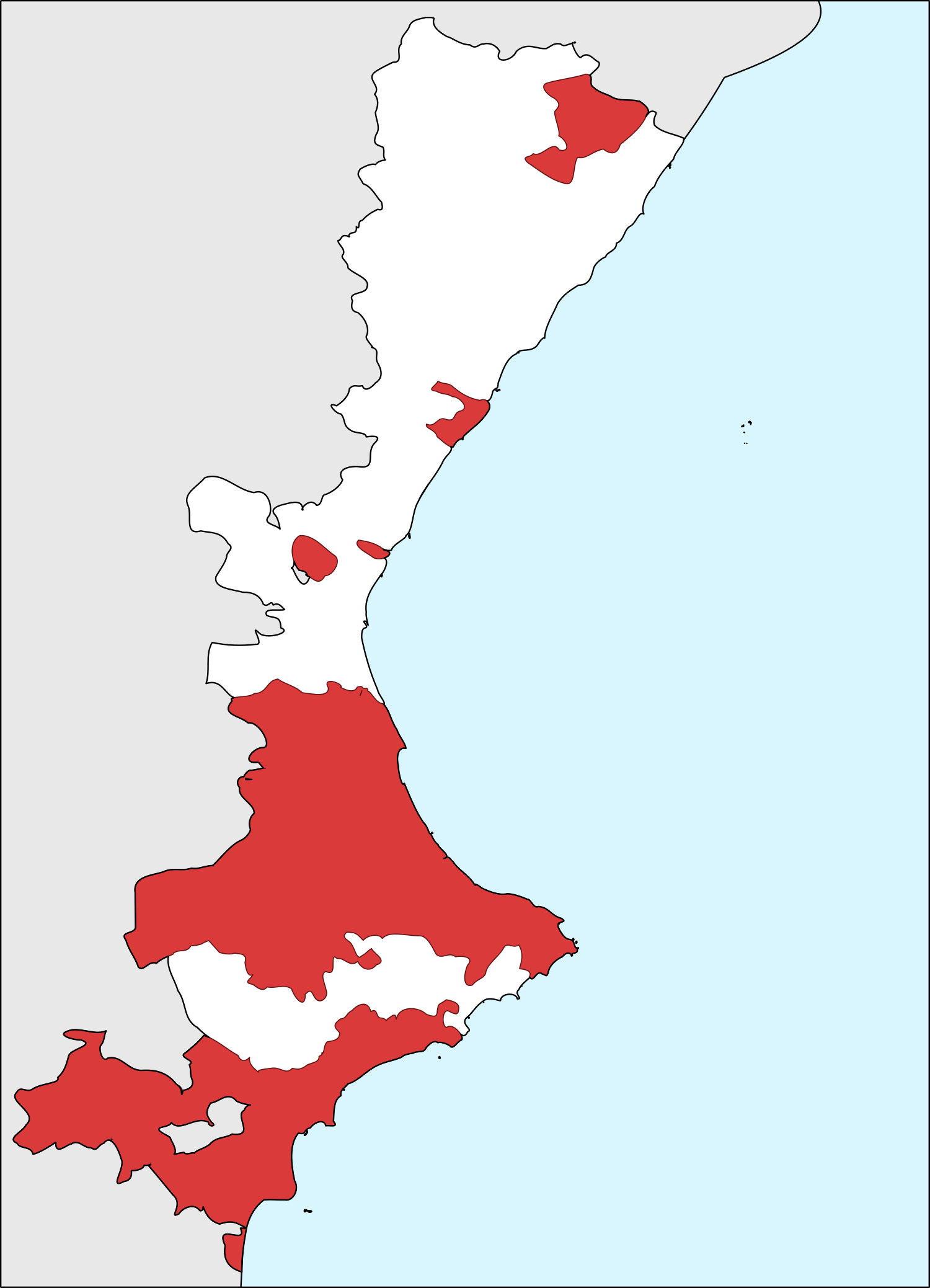 Armonía vocálica en valenciano.